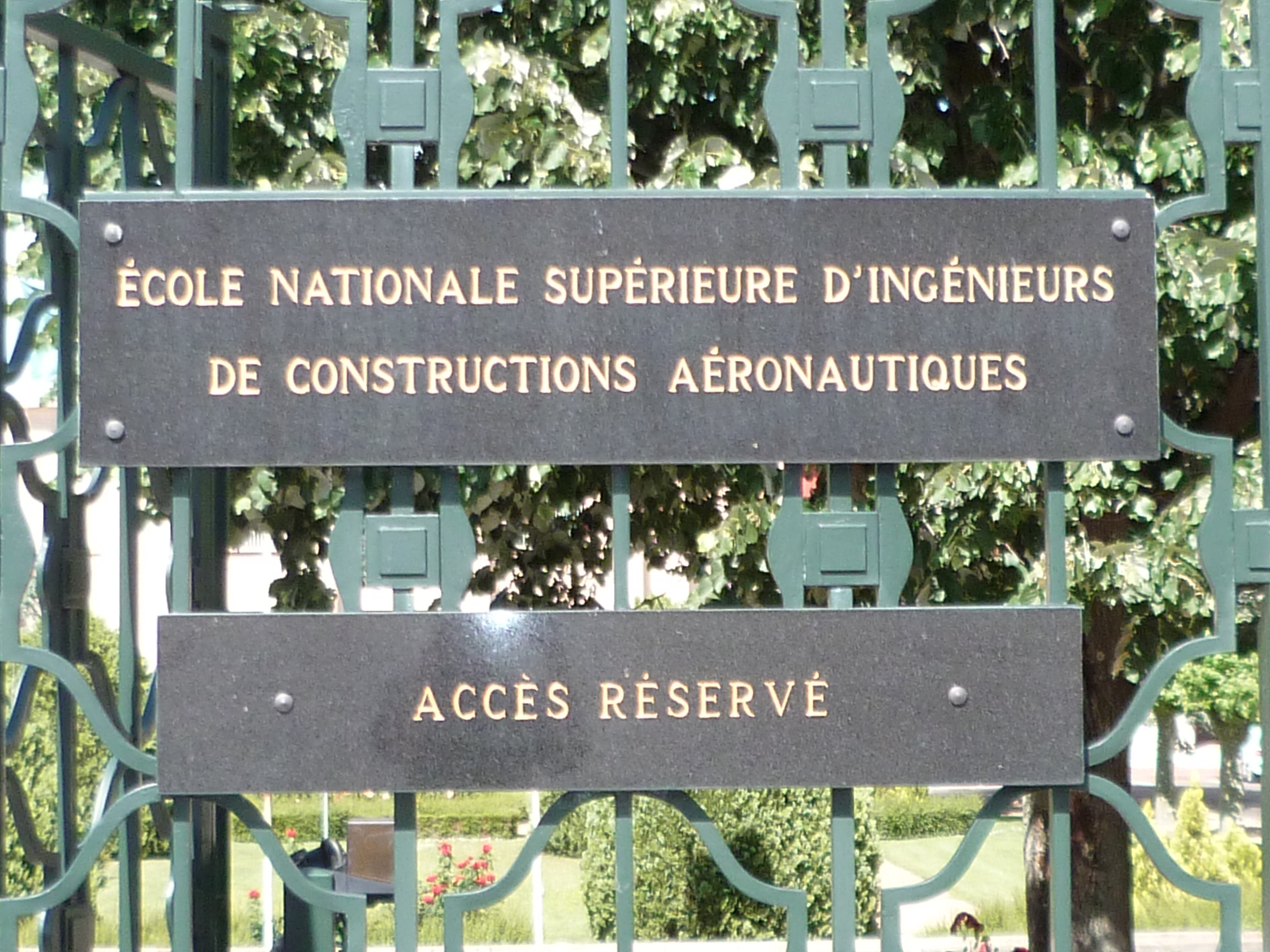 Enseigne de l'école nationale supérieure d'ingénieurs de constructions aéronautiques sur le portail de l'école de la Juncasse en 2010